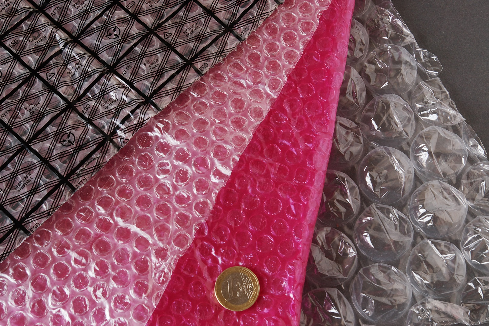 Verschiedene Luftpolsterfolien, von links nach rechts: 1. elektrisch leitfähig bedruckt, 2. Standardfolie, 3. antistatisch ausgerüstet für elektronische Komponenten, 4. Großnoppenfolie.